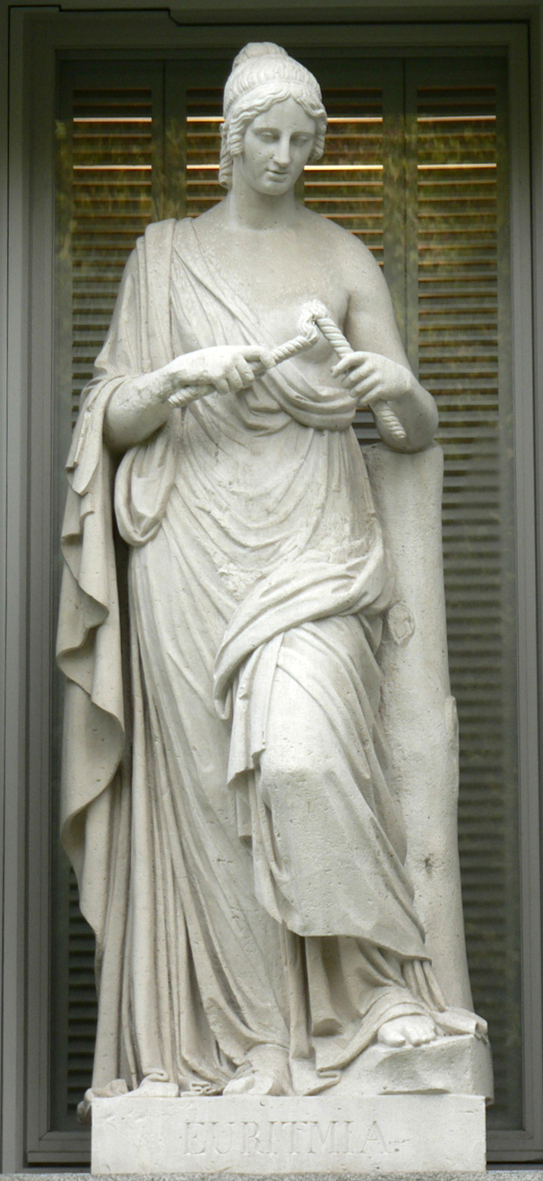 Estatua alegórica de la Euritmia, esculpida en mármol entre 1830 y 1836, por Valeriano Salvatierra, en la fachada del Museo del Prado, Madrid.